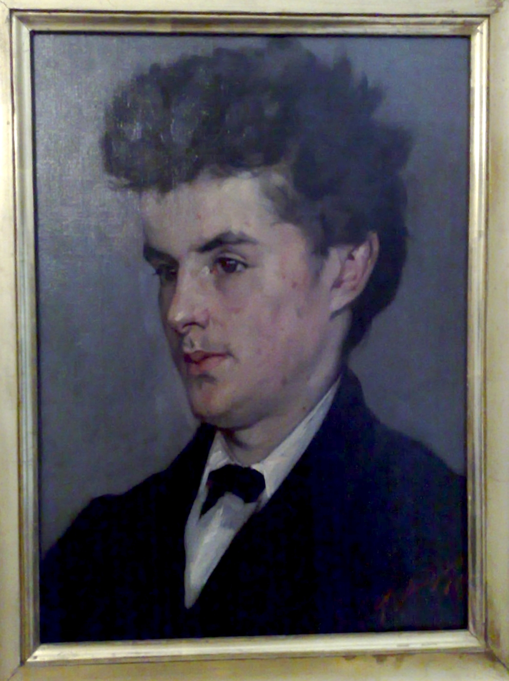 Le Graveur Laval (1879) by Auguste Baud-Bovy, oil on canva 36 x 27cm